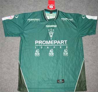 camiseta de Wanderers 2004